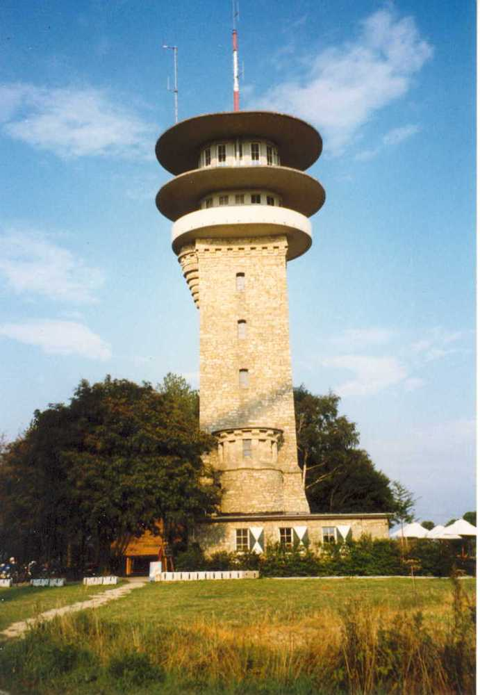 Der Longinusturm in den Baumbergen, eigenes Bild, copyright: GNU FDL